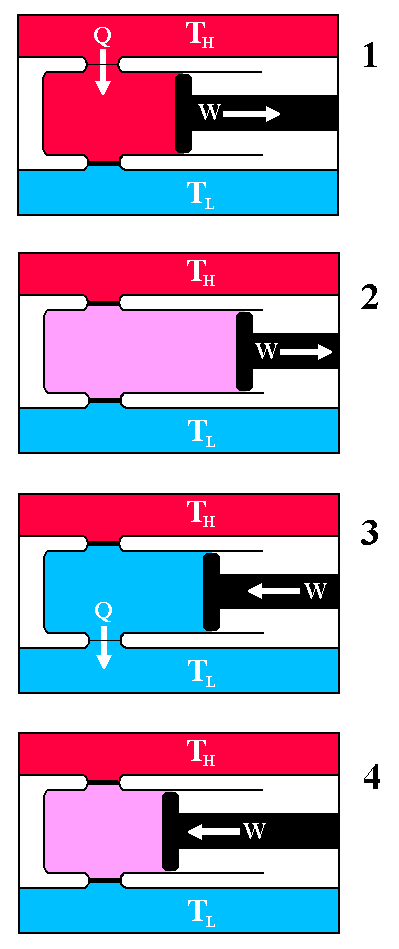 סכמה של פעולת מנוע קרנו (צוייר על ידי)